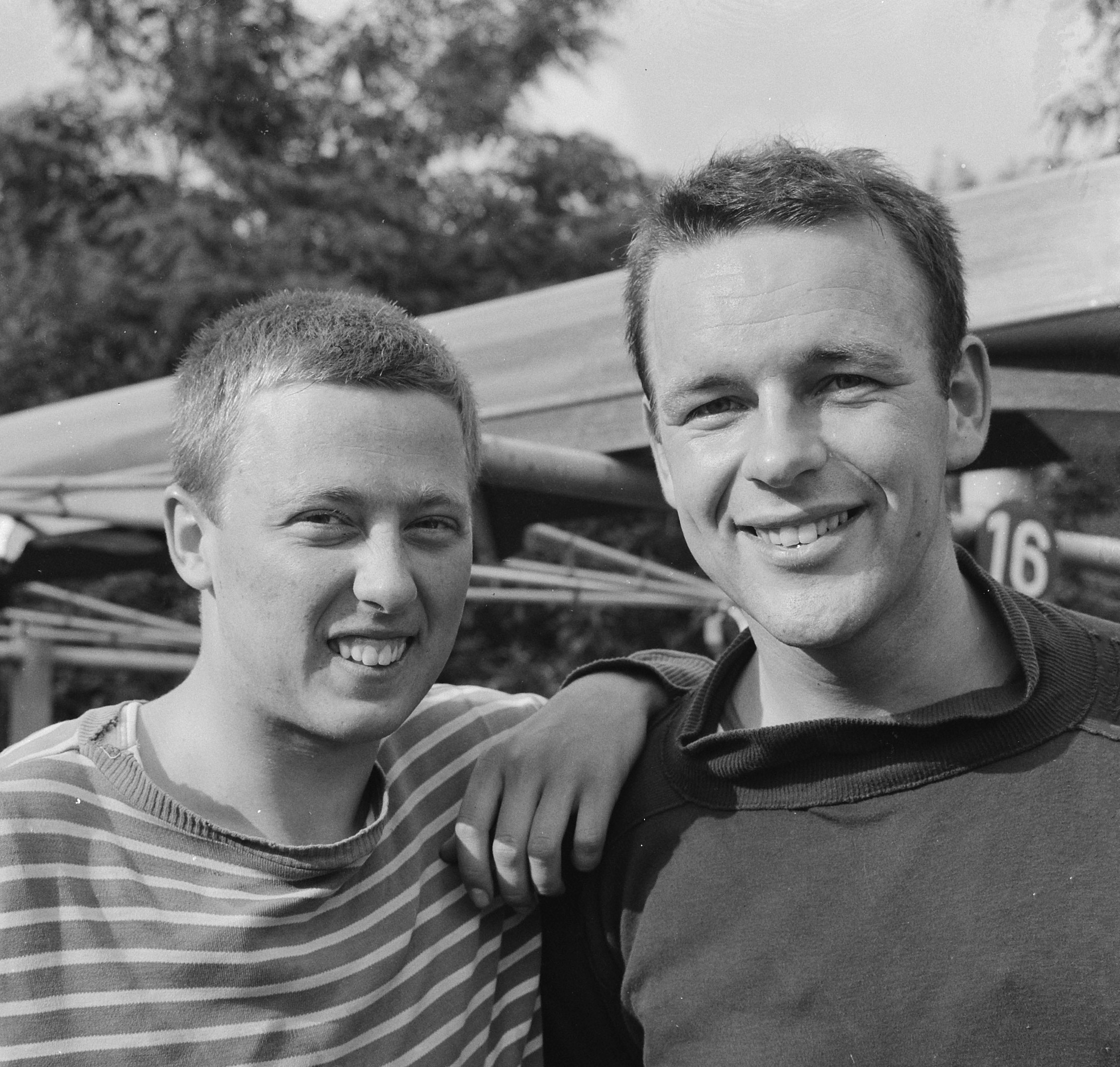 Roeien in Duisburg op de Wedaubaan, senioren dubbel zegevierden links Bots (slag) en M. B. Alwin van de R. V. Willems